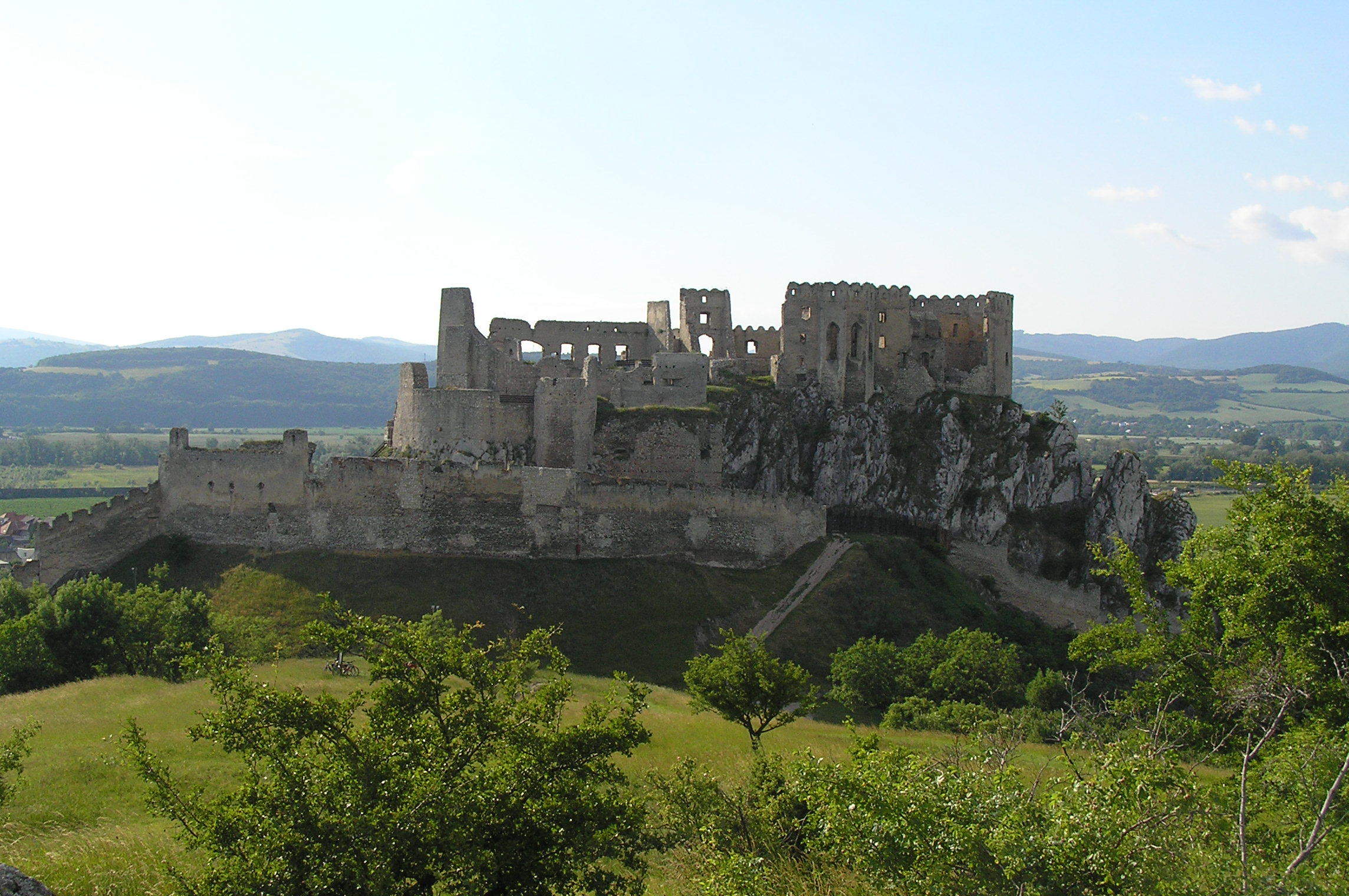 Ruiny beckovského hradu v prvom decéniu 21. storočia